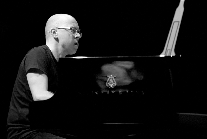 Jaz pianist Marcin Wasilewski, 2008